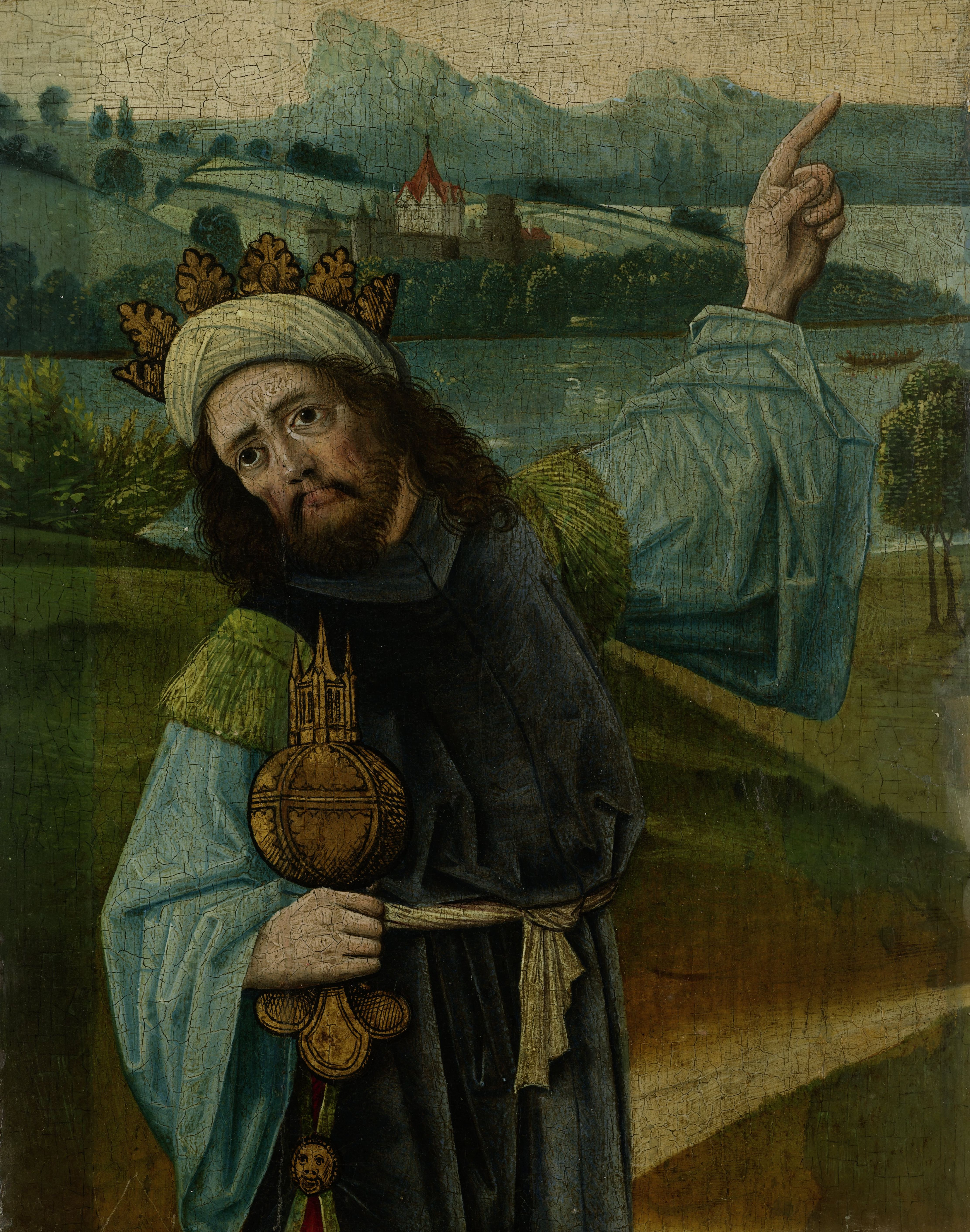 Caspar of Melchior, één van de drie koningen. Staande met het geschenk in de rechterhand, omhoogwijzend met de linkerhand. Evenals SK-A-2545 fragment van een altaarstuk.